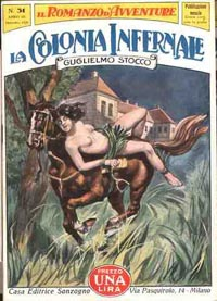 Copertina del romanzo La colonia infernale di Guglielmo Stocco, collana Il Romanzo d'Avventure, Sonzogno, dicembre 1926. Autore dell'illustrazione ignoto.